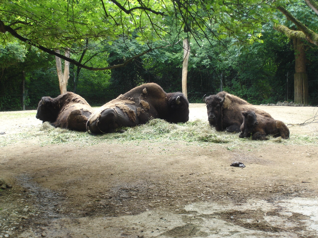 Bisons im Zoo Basel